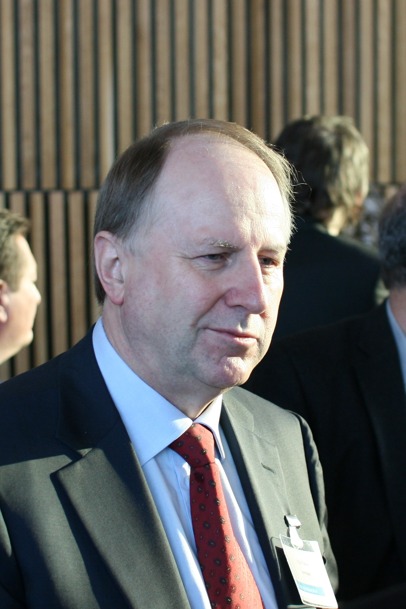 Ola T. Lånke, stortingsrepresentant fra Sør-Trøndelag (KrF). Fra NHOs Årskonferanse 2009.